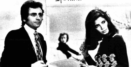 Italian actors Toni Santagata and Laura Belli